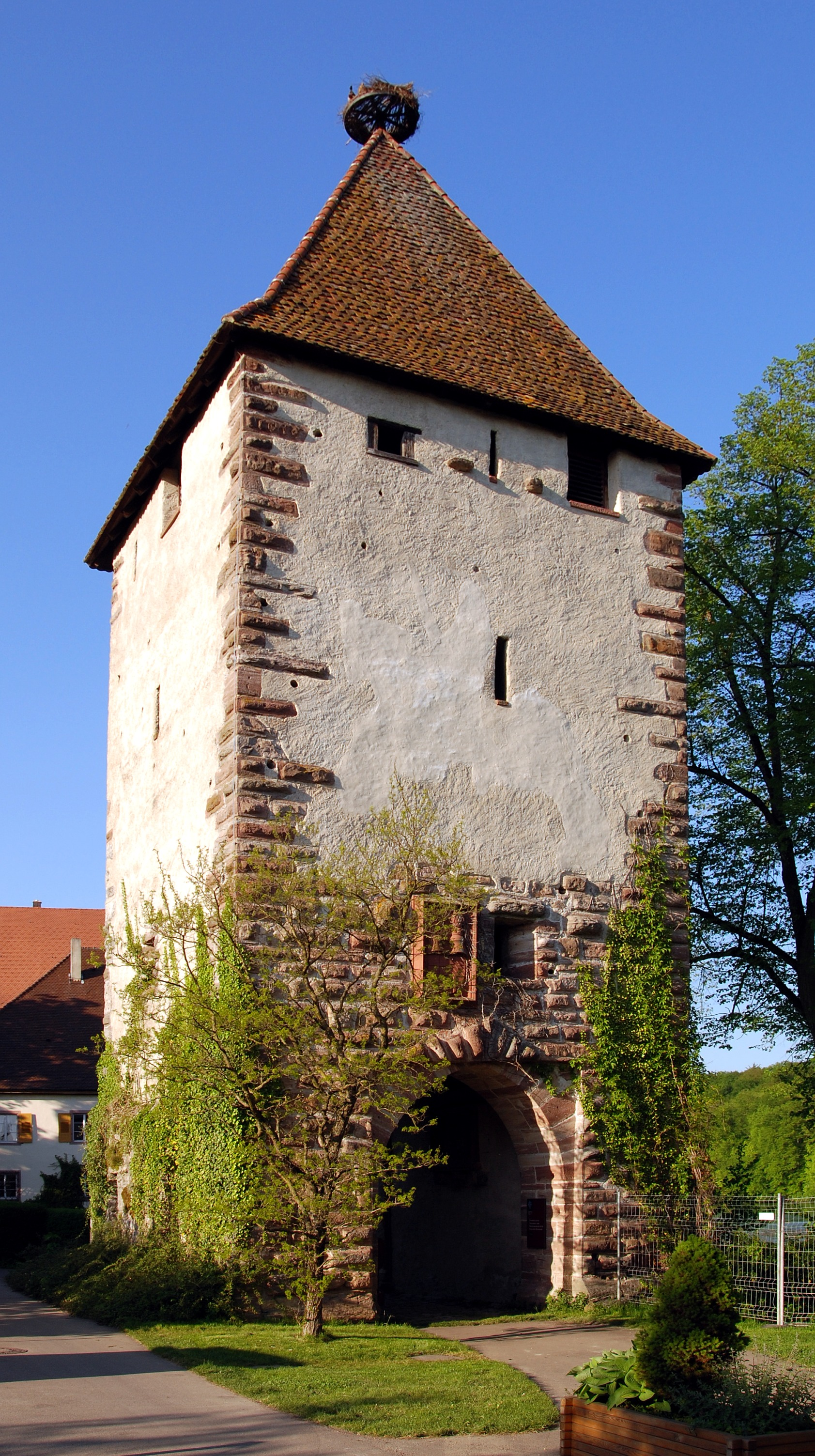 Schloss Beuggen: Storchenturm